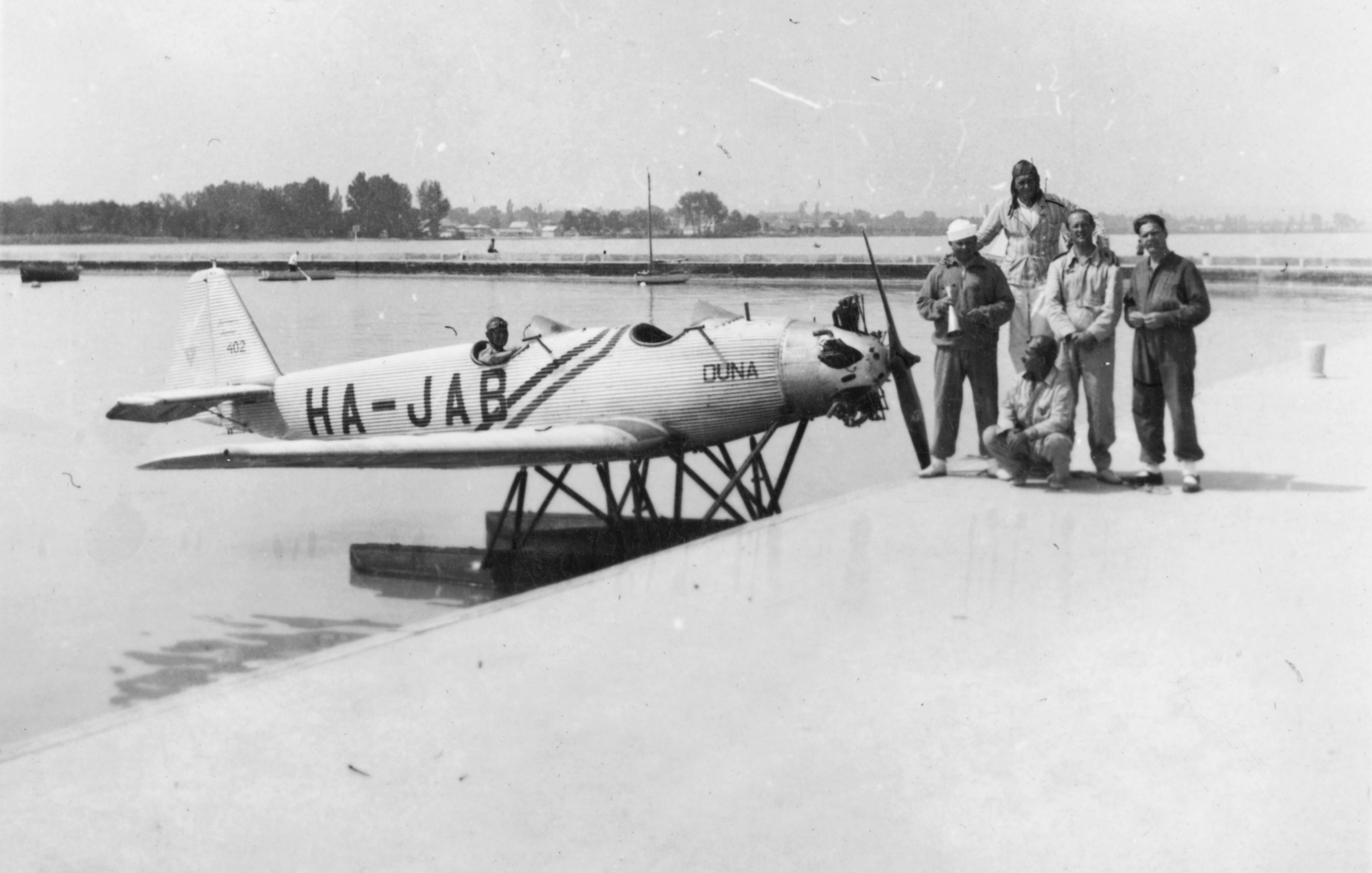 Junkers A-50 Junior hidroplán kiképző repülőgép a Balatonon. HA-JAB Location: Hungary, Balatonújhely Tags: transport, vehicle, airplane, Junkers-brand, hydroplane, Gerrman brand Title: Junkers A-50 Junior hidroplán kiképző repülőgép a Balatonon.